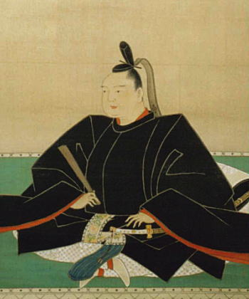 池田忠継（第3代岡山城主）、Ikeda Tadatsugu(the 3rd Okayama castellan)